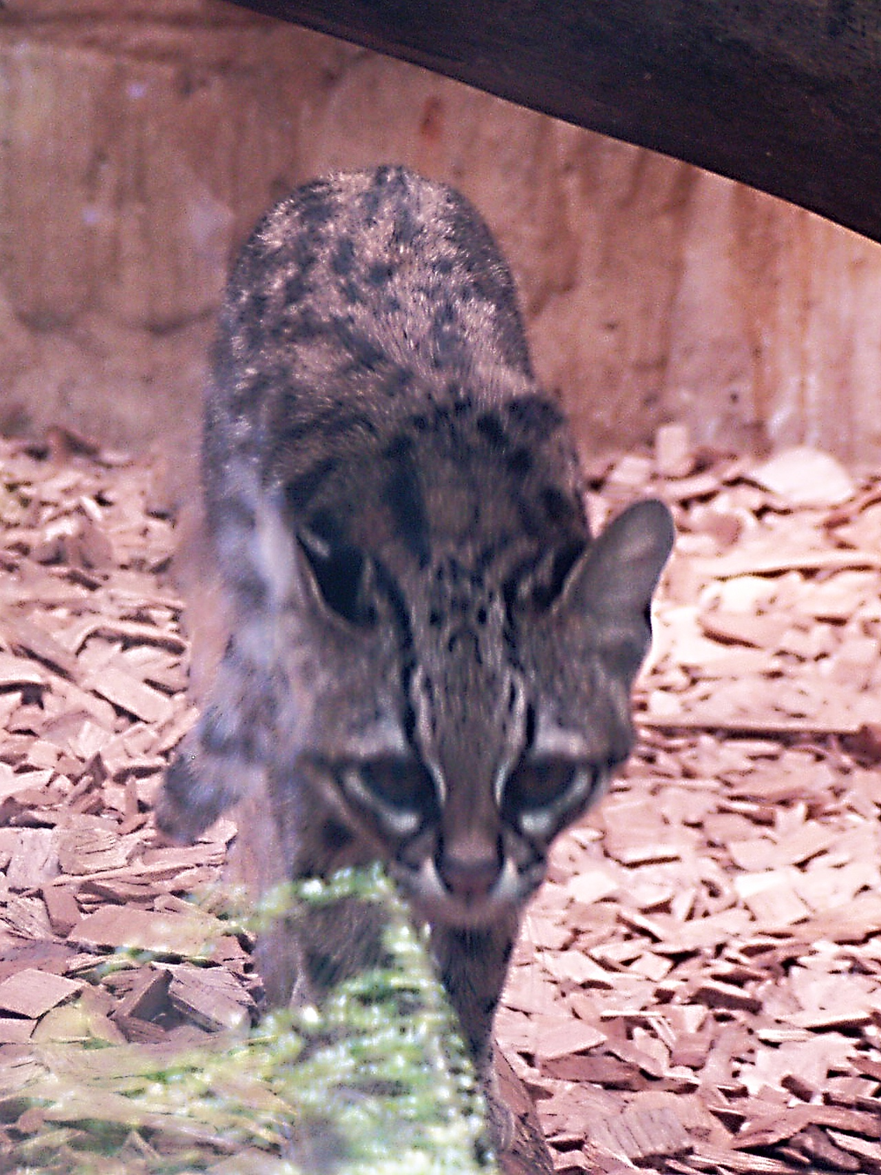 Leopardus tigrinus (Prague Zoo)